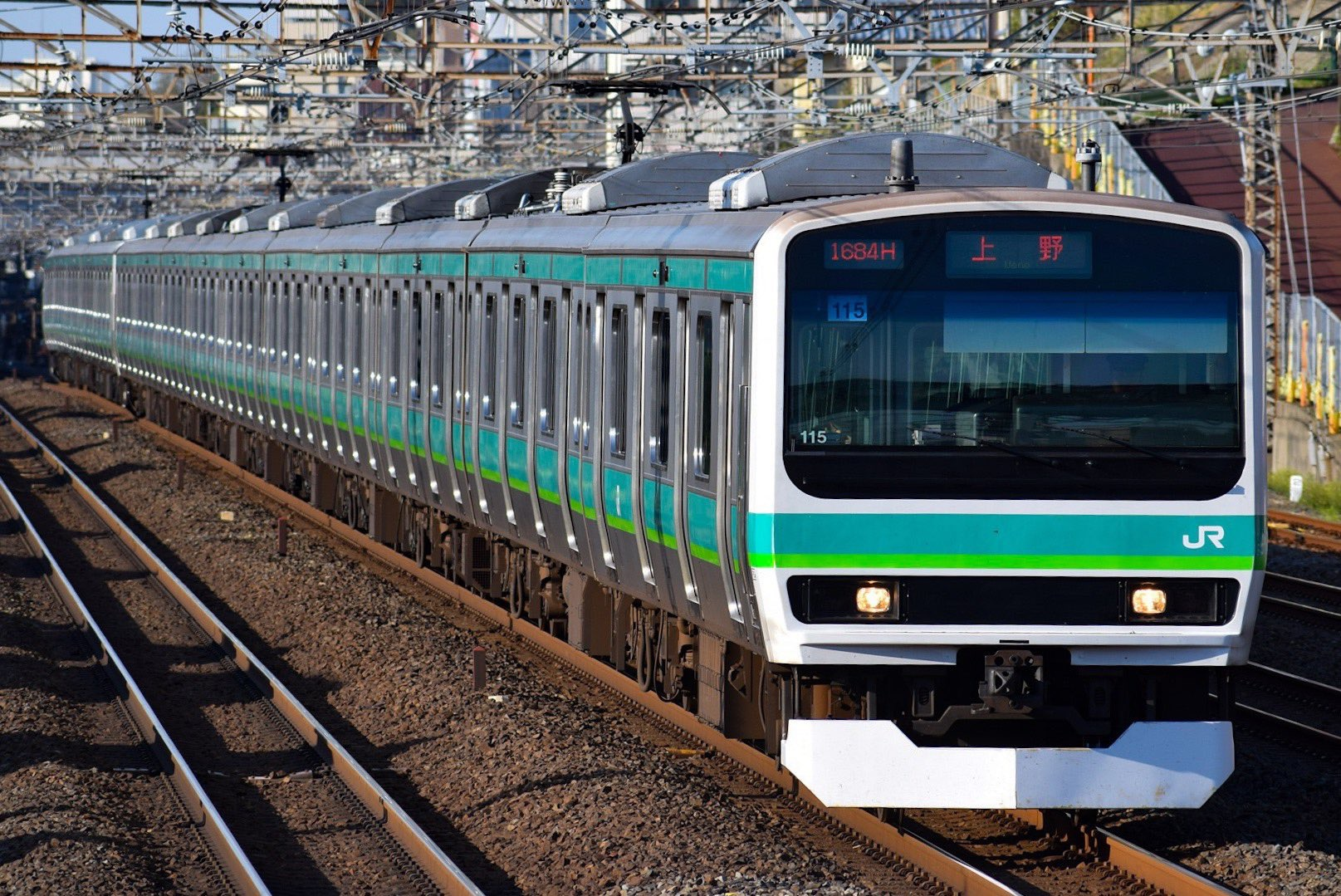 常磐快速線を走行するE231系0番台マト115編成(1684H 快速上野行)